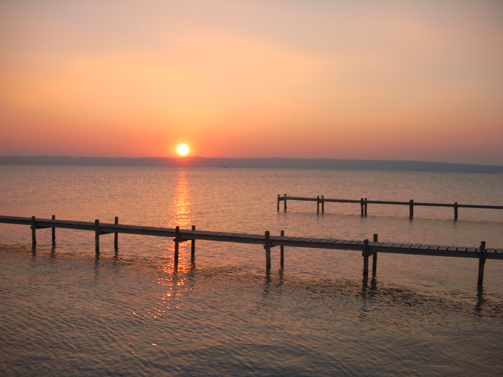 eigenes foto, sommer 2004 podersdorf nordstrand - frei unter GNU FDL